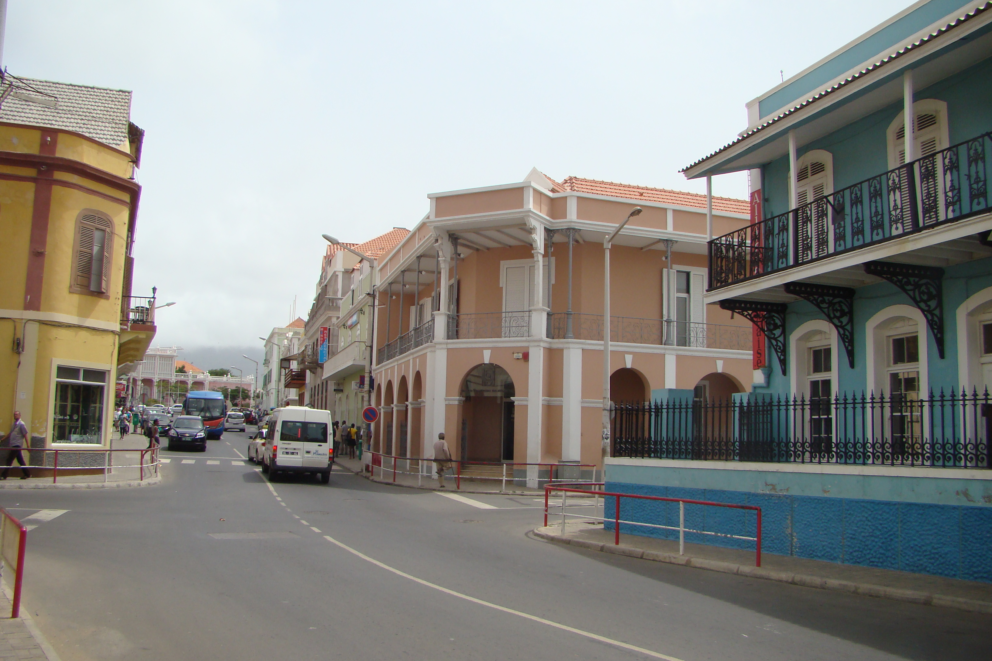 cruce de las calles Lisboa y Avda. 5 de Julio, en Mindelo, Cabo Verde